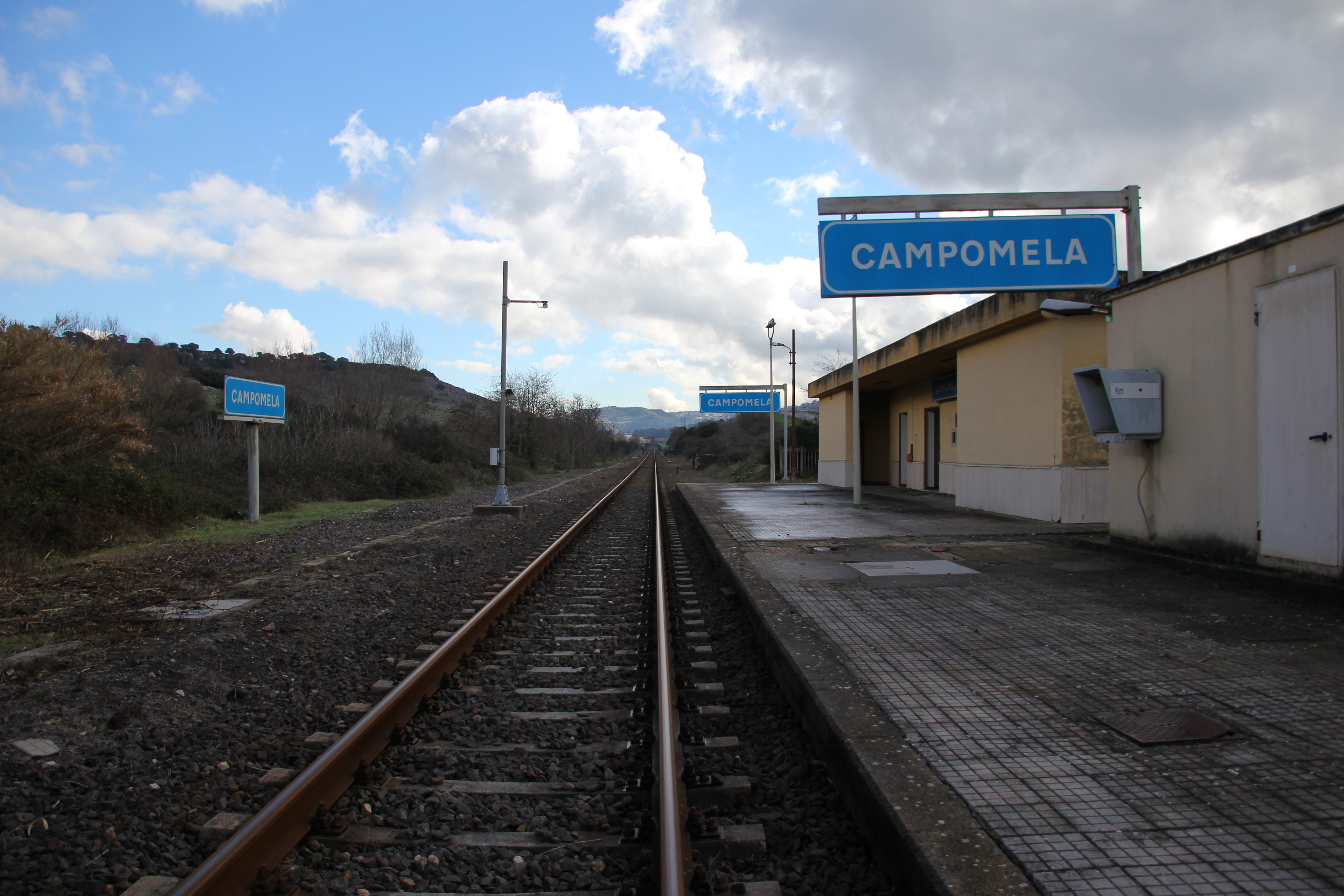 Cargeghe - Stazione di Campomela